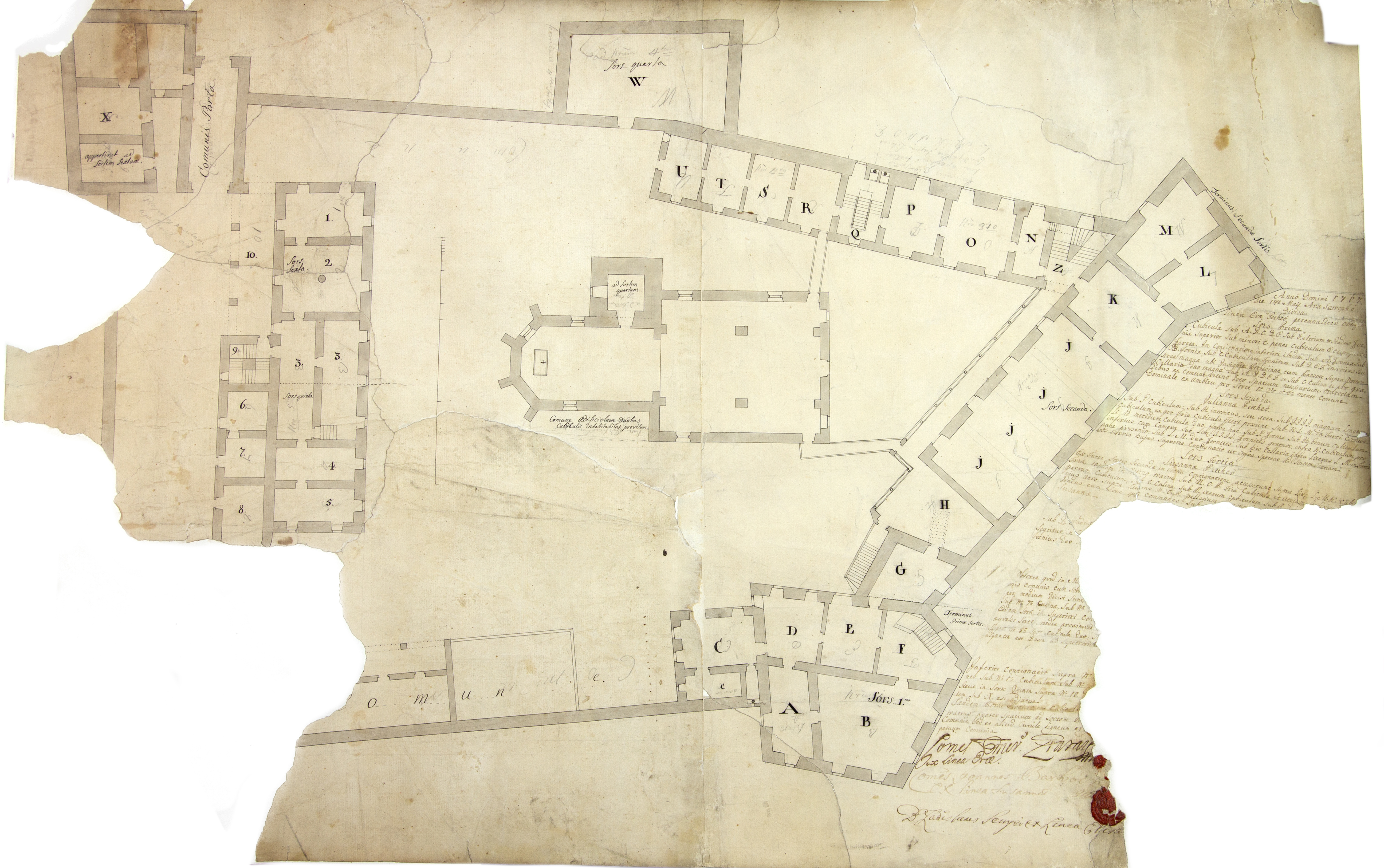 Plán hradu zo 14. 5. 1767, nachádzajúci sa v Štátnom archíve v Prešove